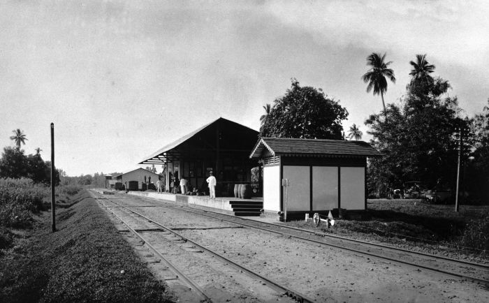 Foto. Station van Laboean aan de Deli-spoorlijn, oostkust Sumatra